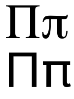 greek letter pi